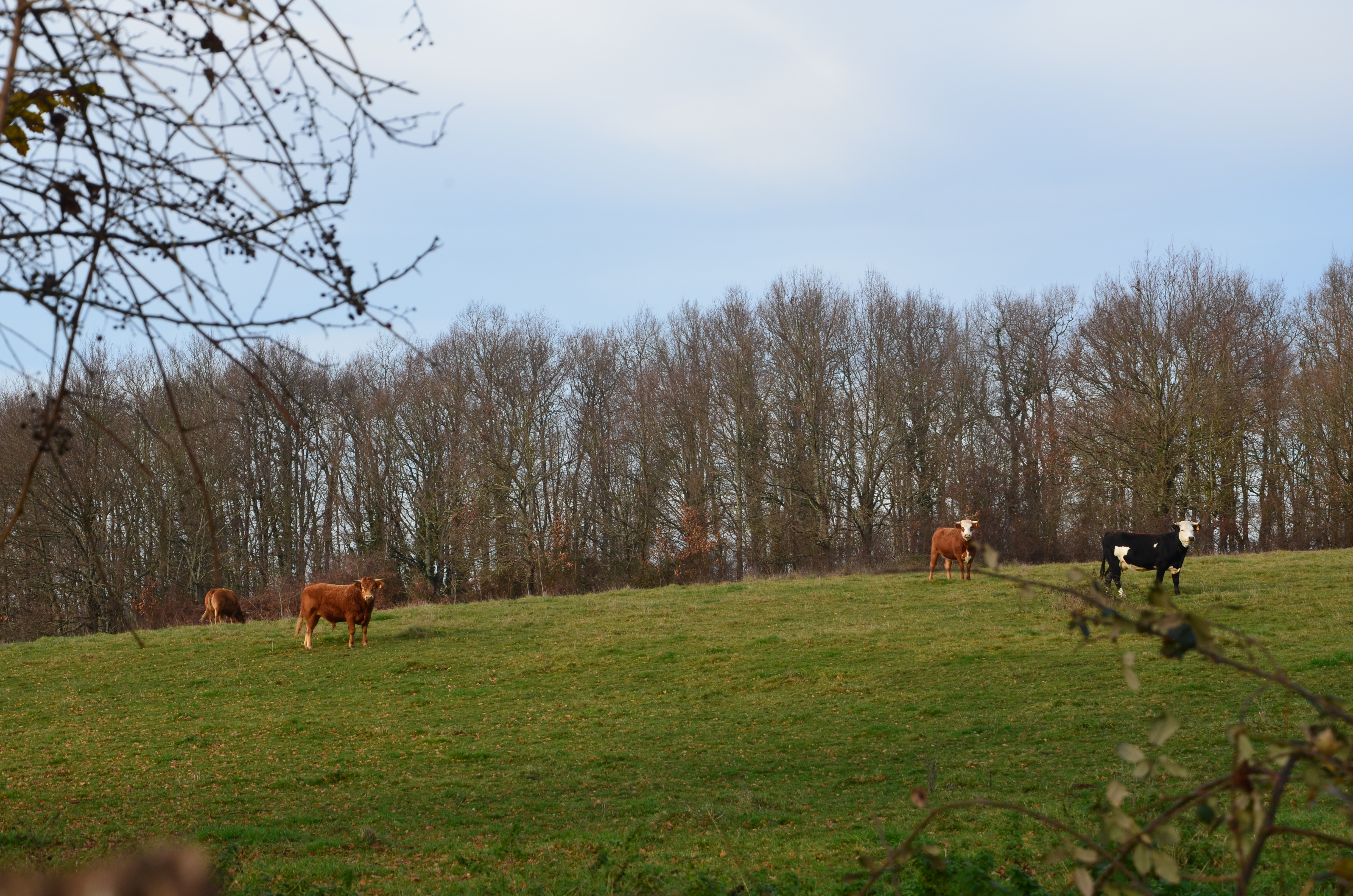 paturage